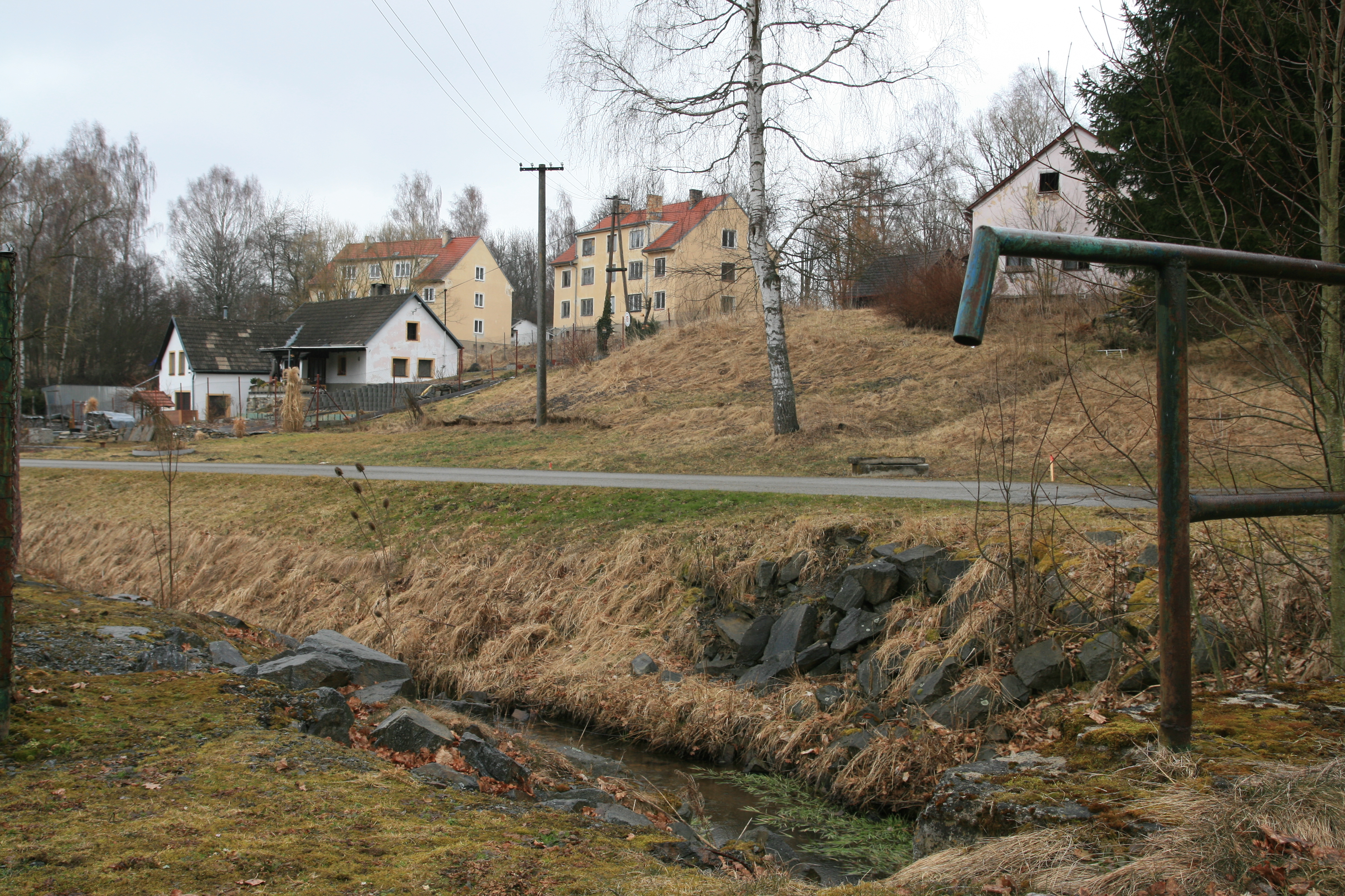 Vesnice Hněvanov, část obce Rožmitál na Šumavě v okrese Český Krumlov. Pohled přes Rožmitálský potok na východní stranu vsi. Zprava dům č. 30 (bílý), vícepatrové domy č. 39 a 38, blíže k cestě č. 9.